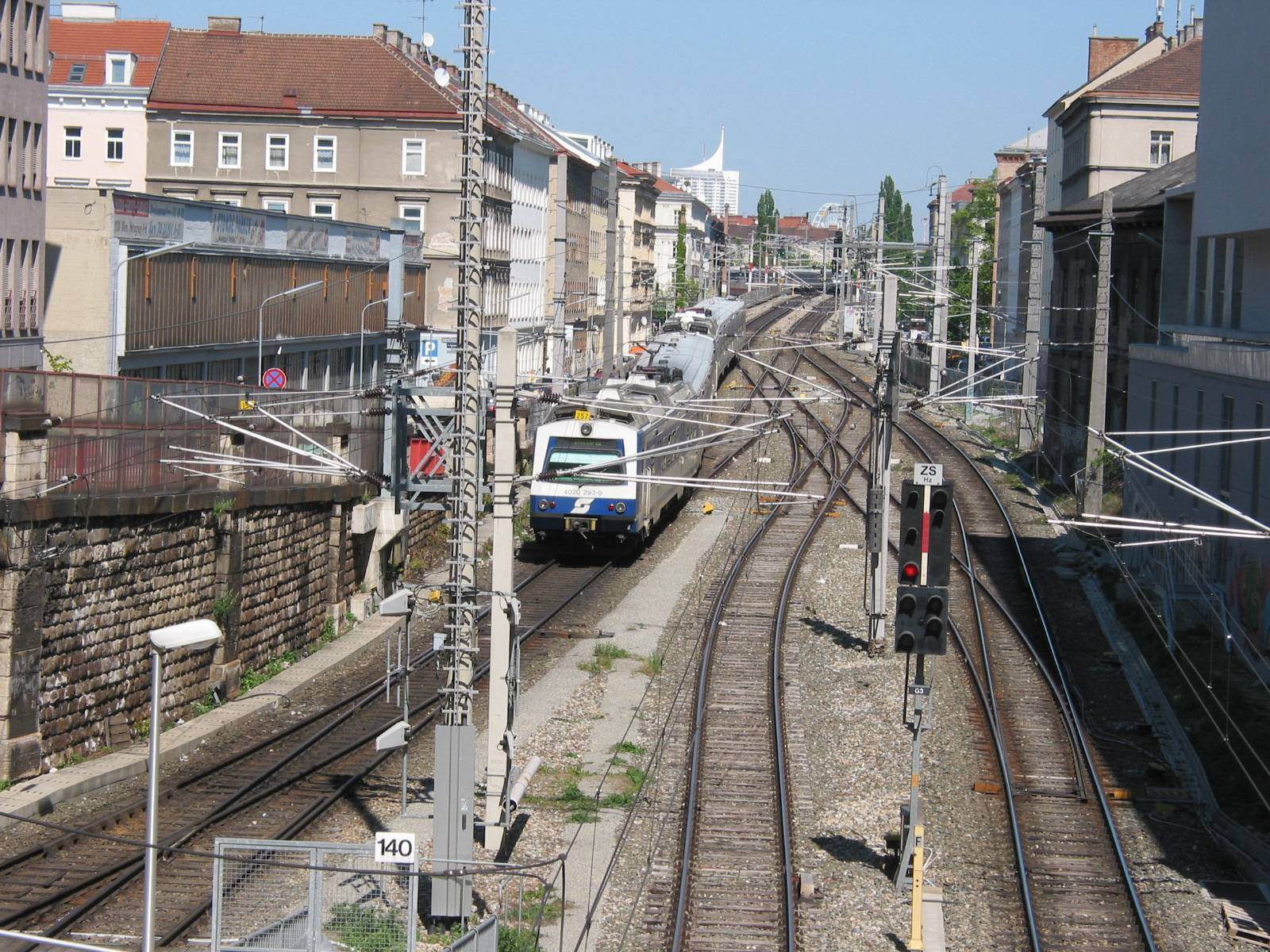 de: S-Bahn bei Wien Mitte en: S-Bahn near Wien Mitte